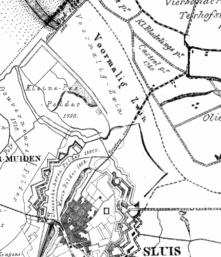 Kasteelpolder